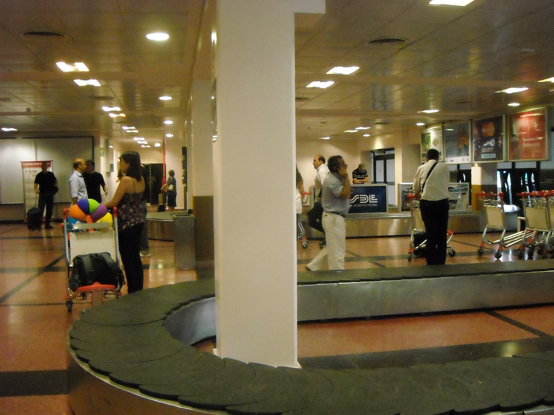 Area de arribos del Aeropuerto Internacional de Salta Martín Miguel de Güemes.